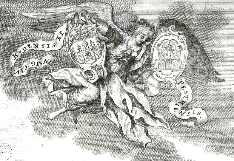 Mikoviny Sámuel Buda és Pest látképének részlete a Notitiából, 1737